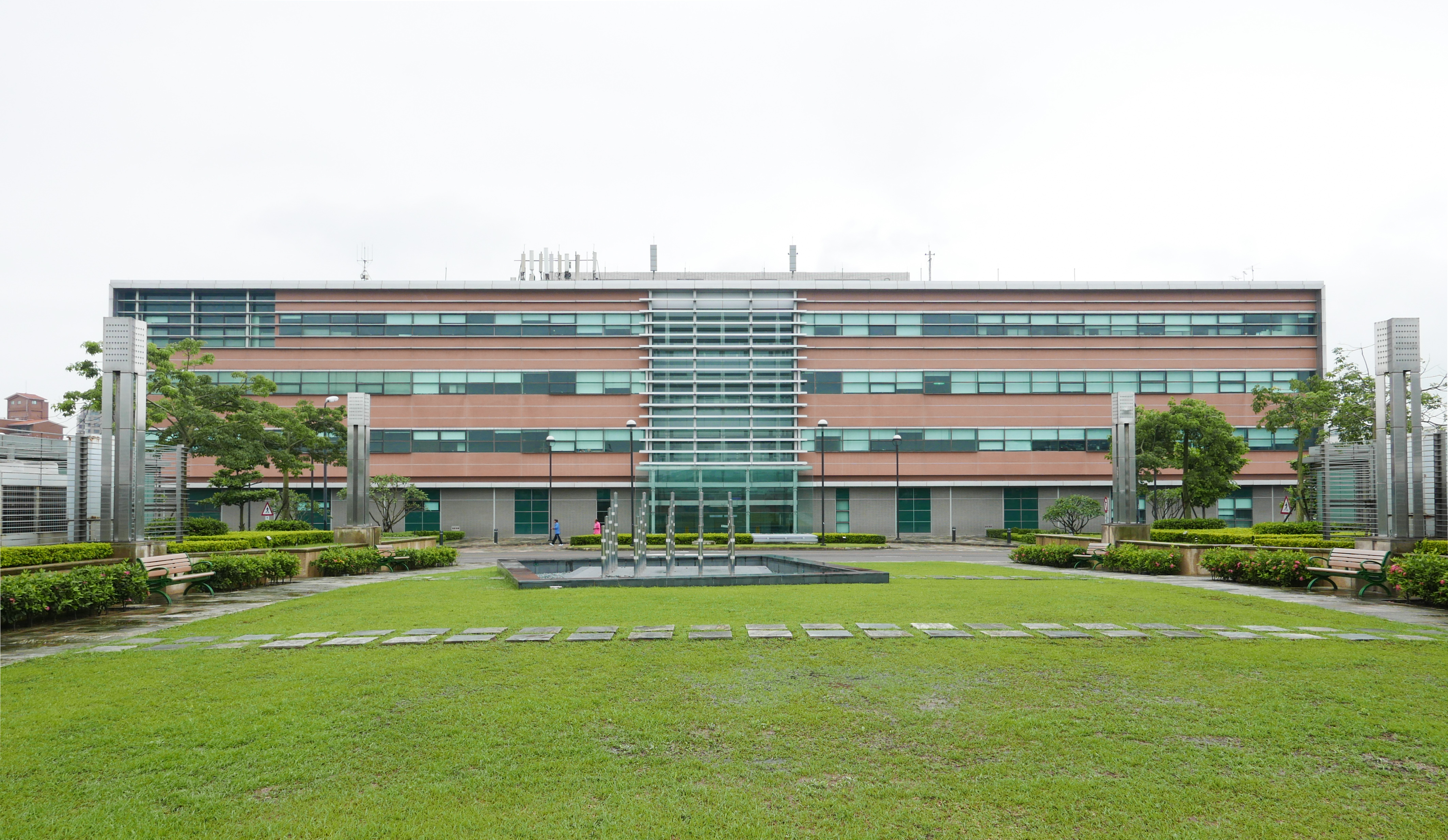 台灣高鐵運務管理中心(OMC)，位於台灣高鐵桃園站旁。